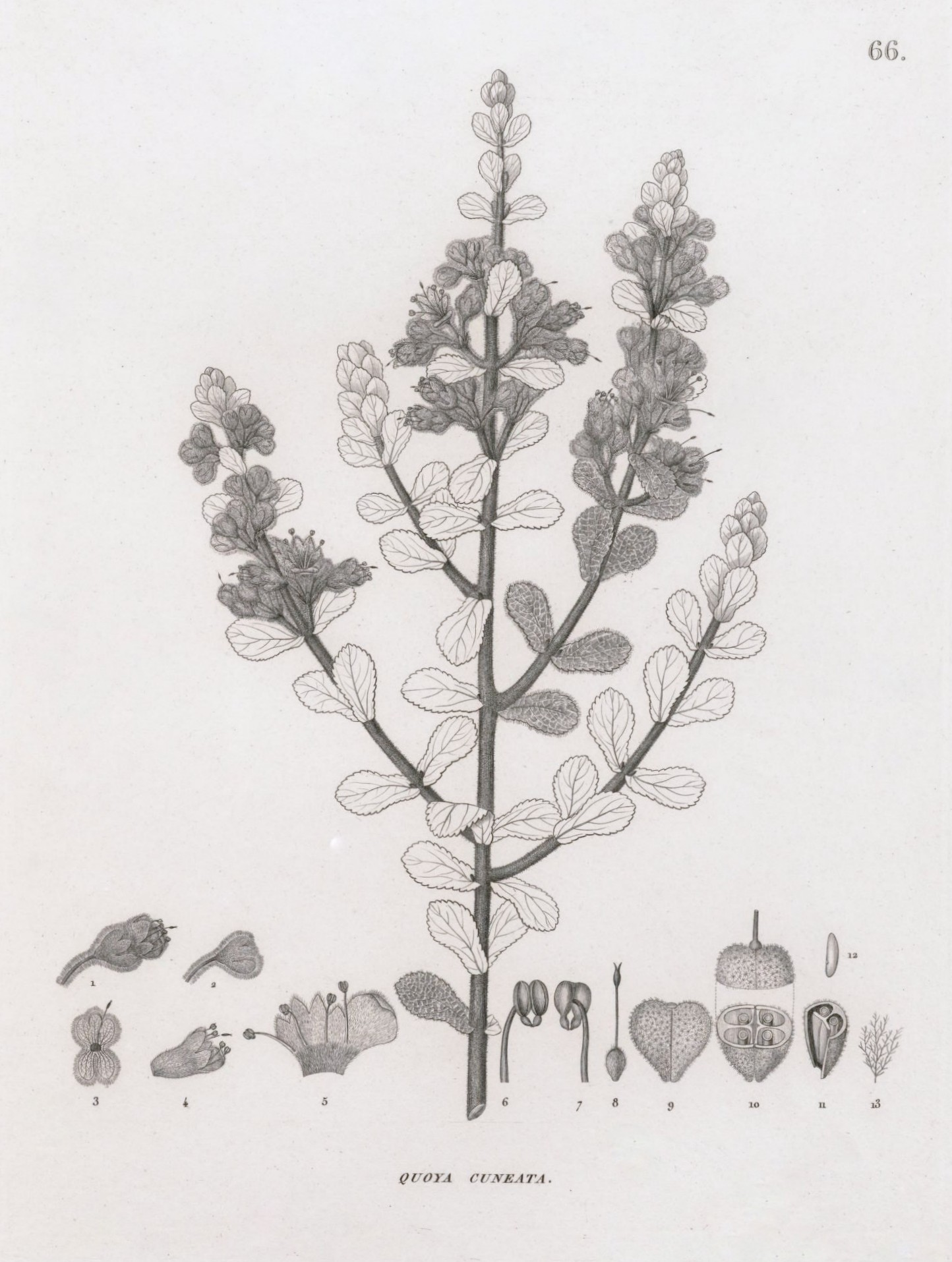 Quoya Cuneata - Leyenda: 1: flor, 2: cáliz, 3:cáliz, ovario, estilo y estigma vistos de frente, 4: corola, estambre, estilo y estigma, 5: corola abierta con implantación de los estambres, 6 y 7: estambres, 8: pístil, 9: capsula bivalva, tetralocular, 10: lo mismo, en corte horizontal, 11: segmento del fruto, 12: óvulo, 13: pelo ramificado.